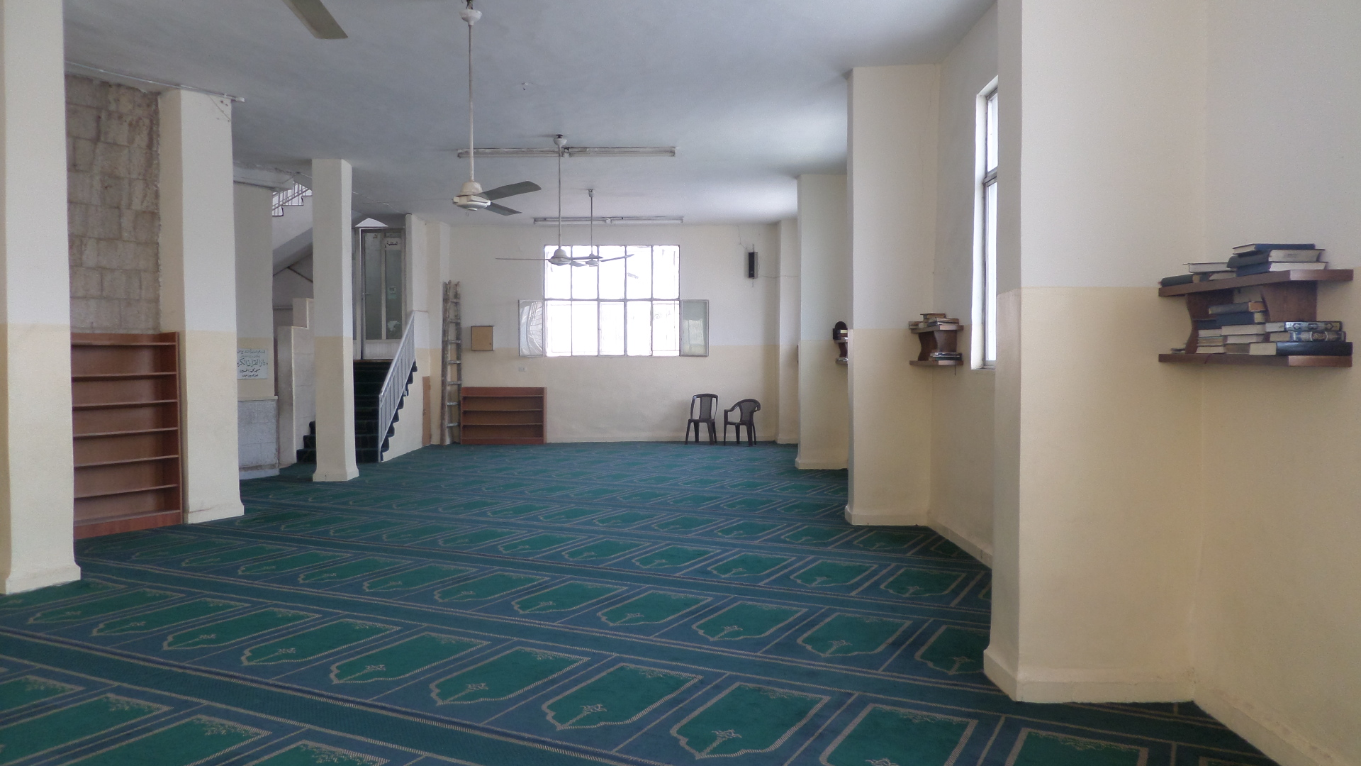 القسم الخارجي للمسجد